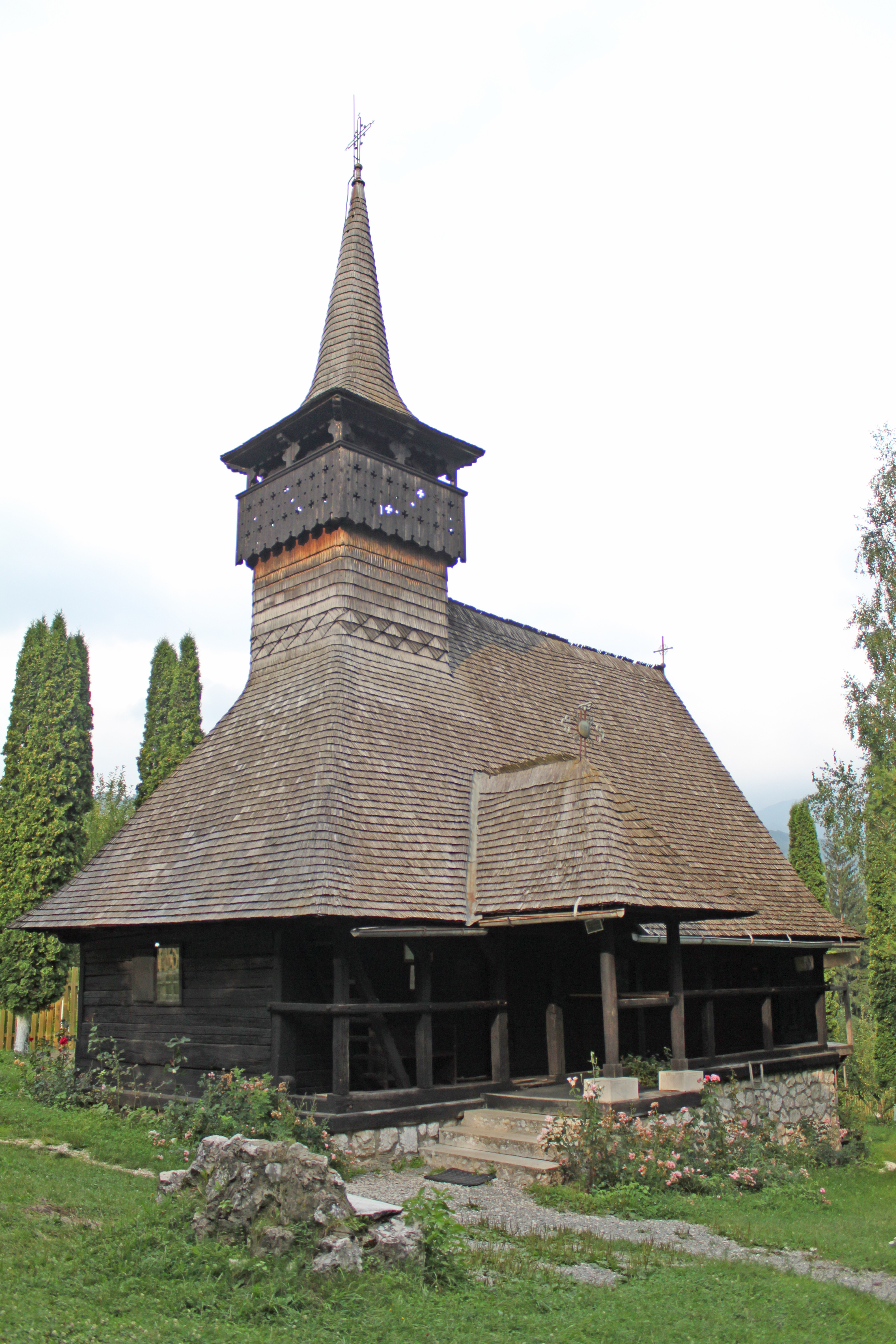 Biserica de lemn din Luna de Sus, judeţul Cluj mutată la schitul Dragoslavele, judeţul Argeş.